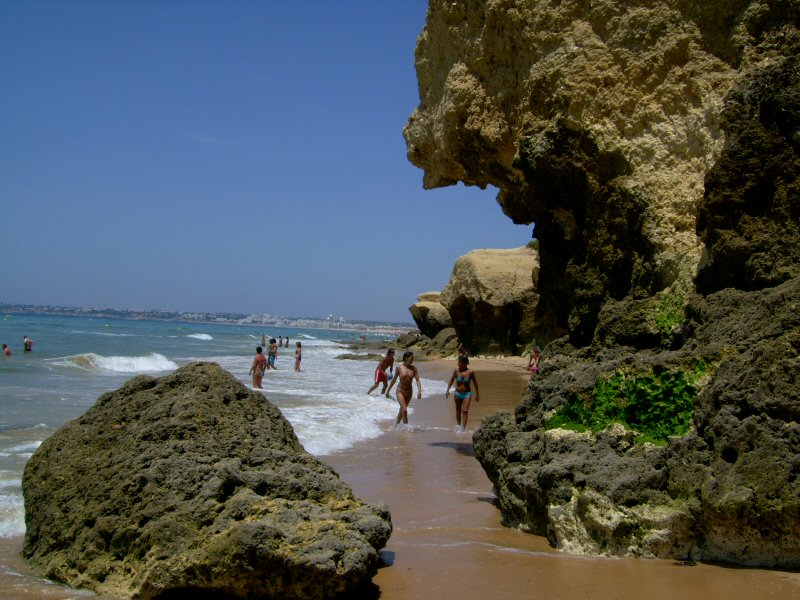 Praia da Galé (east), Albufeira